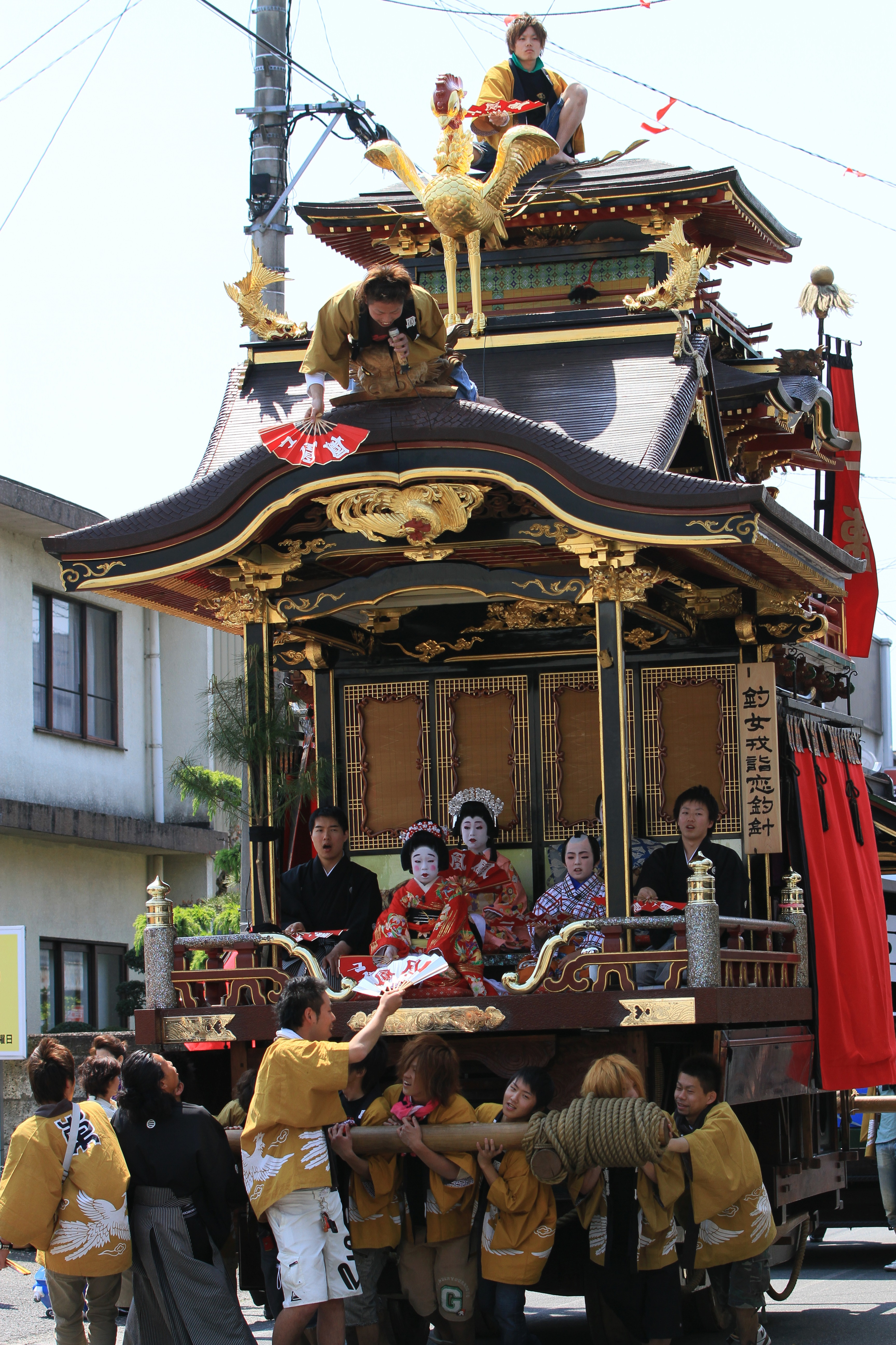 垂井曳やま祭 (岐阜県不破郡垂井町)